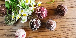 ブリスボールの写真です。